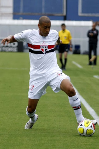 Jorge Wagner em ação no São Paulo Futebol Clube em 2010